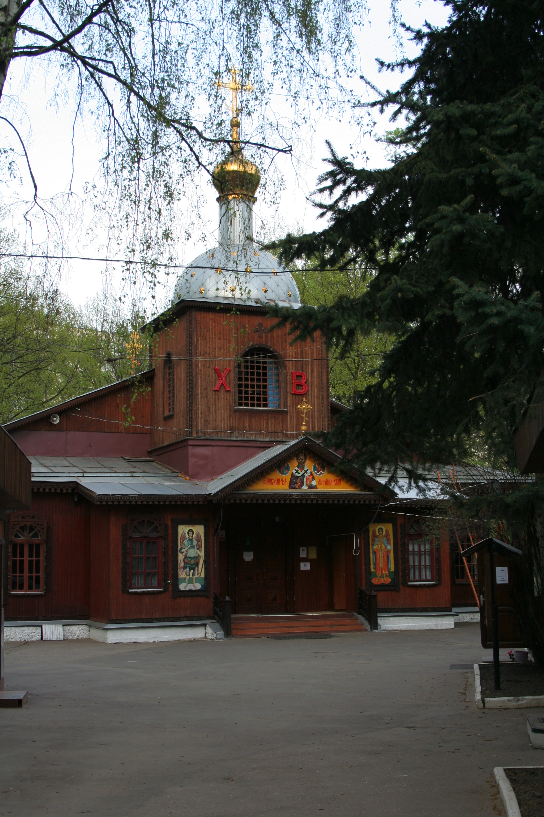 Kirche des Heiligen Nikolaus zu Birjuljowo in Moskau